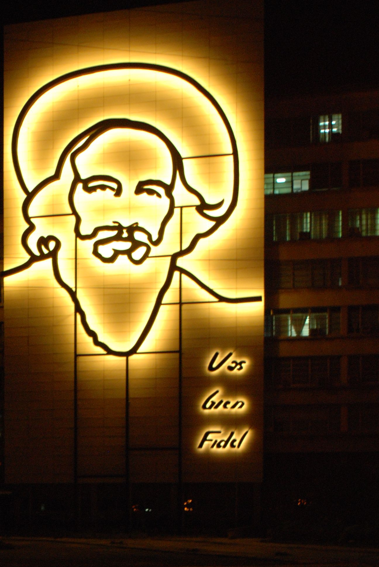 Monumento situado en la Plaza de la Revolición, La Habana. Obra del artista Enrique Ávila, trata de asemejarse a su obra anterior(1993) en memoria al Che(también en ese lugar). Camilo fue inagurado oficialmente el 28 de octubre de 2009.